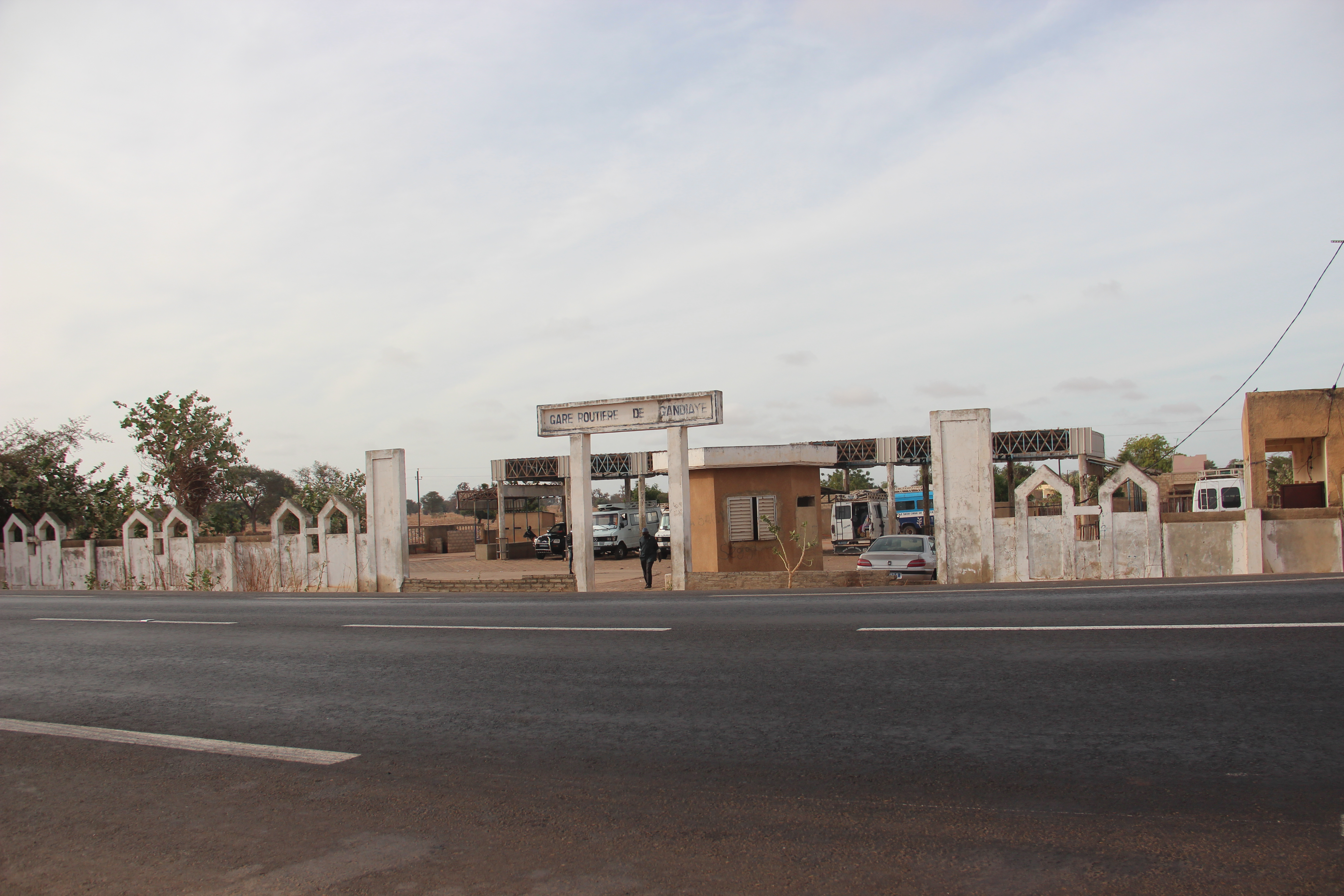 Gare routière de Gandiaye (Sénégal). This is an image with the theme "Africa on the Move or Transport" from: Senegal